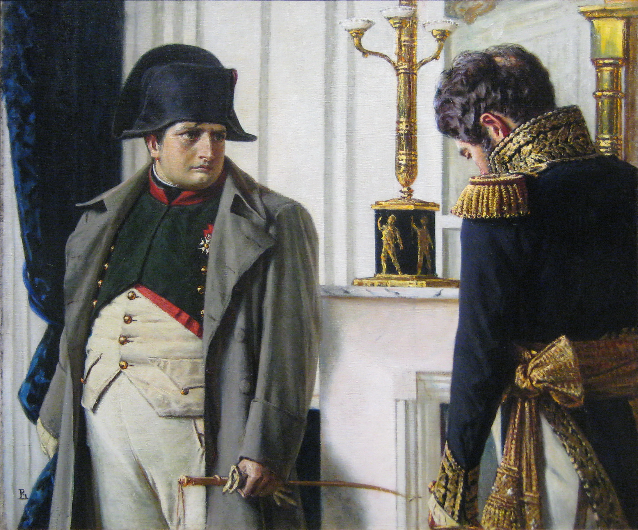 «Наполеон I в России», «1812 год» — известная серия картин Василия Верещагина, посвященных Отечественной войне 1812 года.